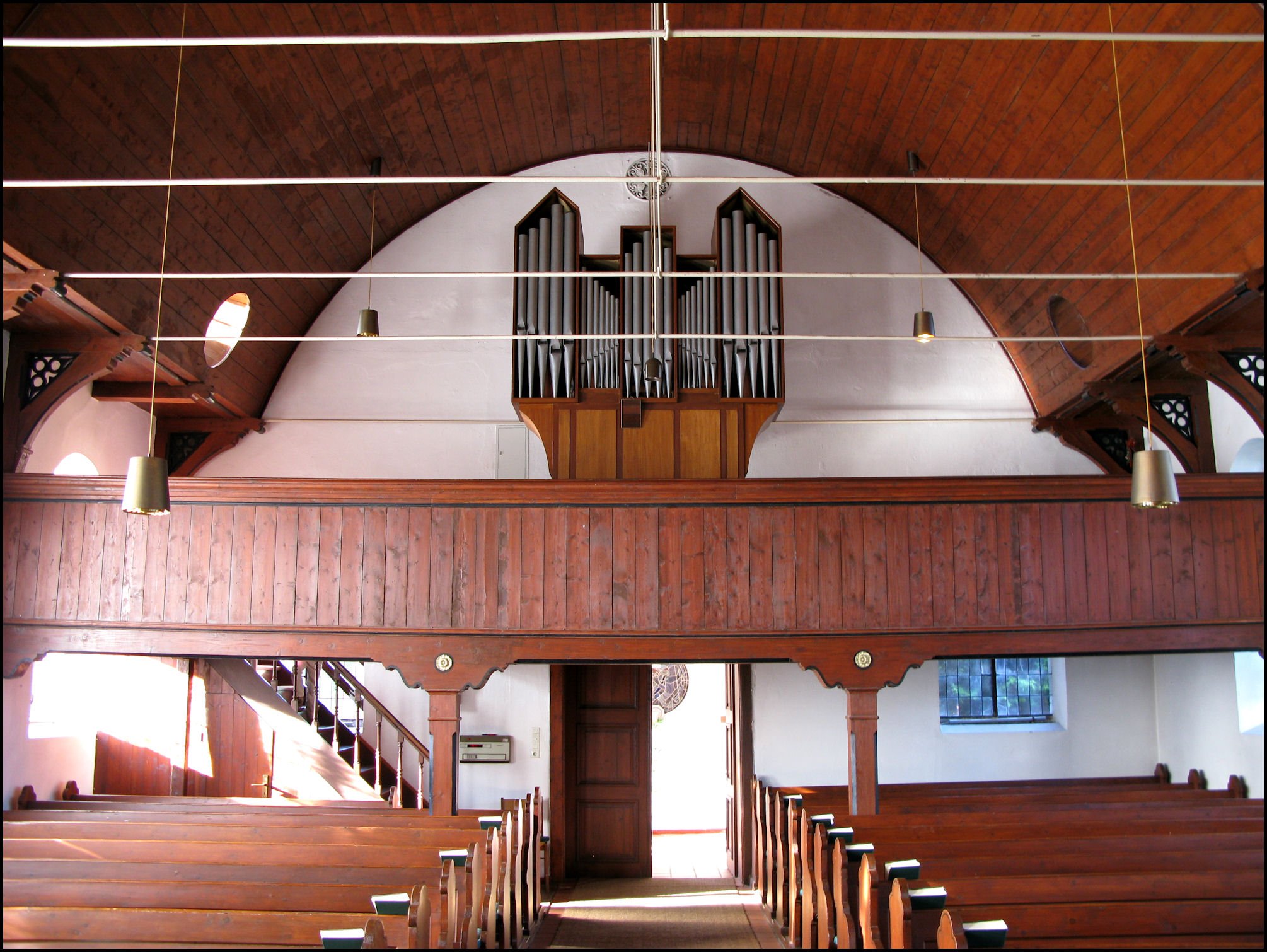 Orgel in Berumerfehn, Landkreis Aurich